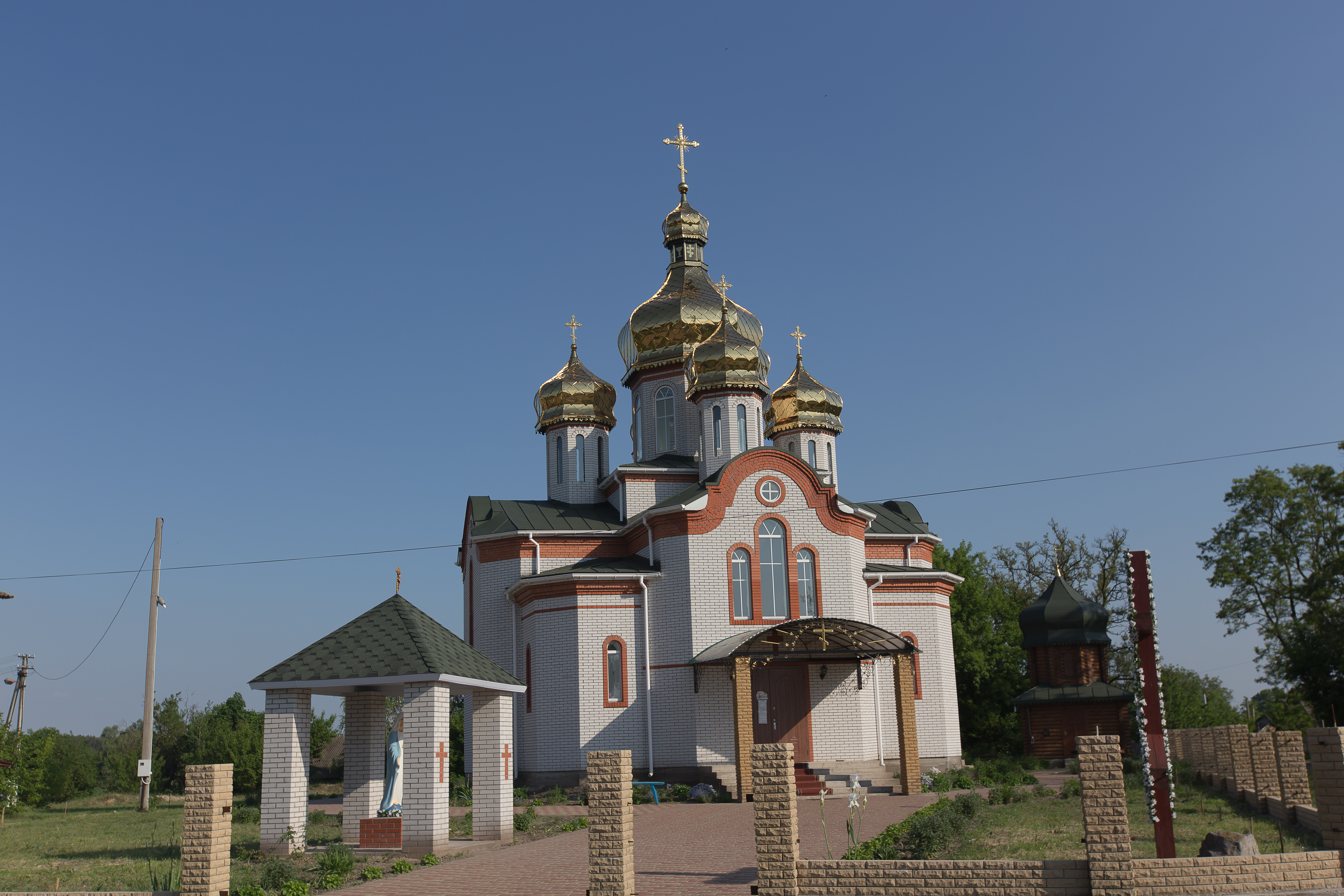 Церковь. с. Сошників. Бориспільської районної Ради Київської області.